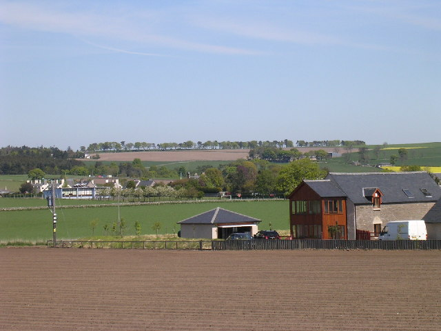 Newbigging, Angus (NO4935)